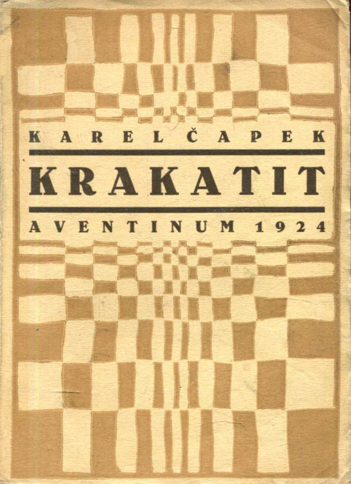 první vydání románu Krakatit